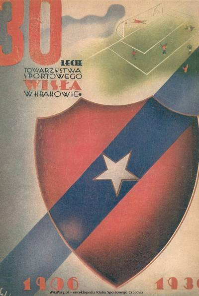 Plakat zum 30 Jahrestag des bestehens des Vereins Wisla Krakow